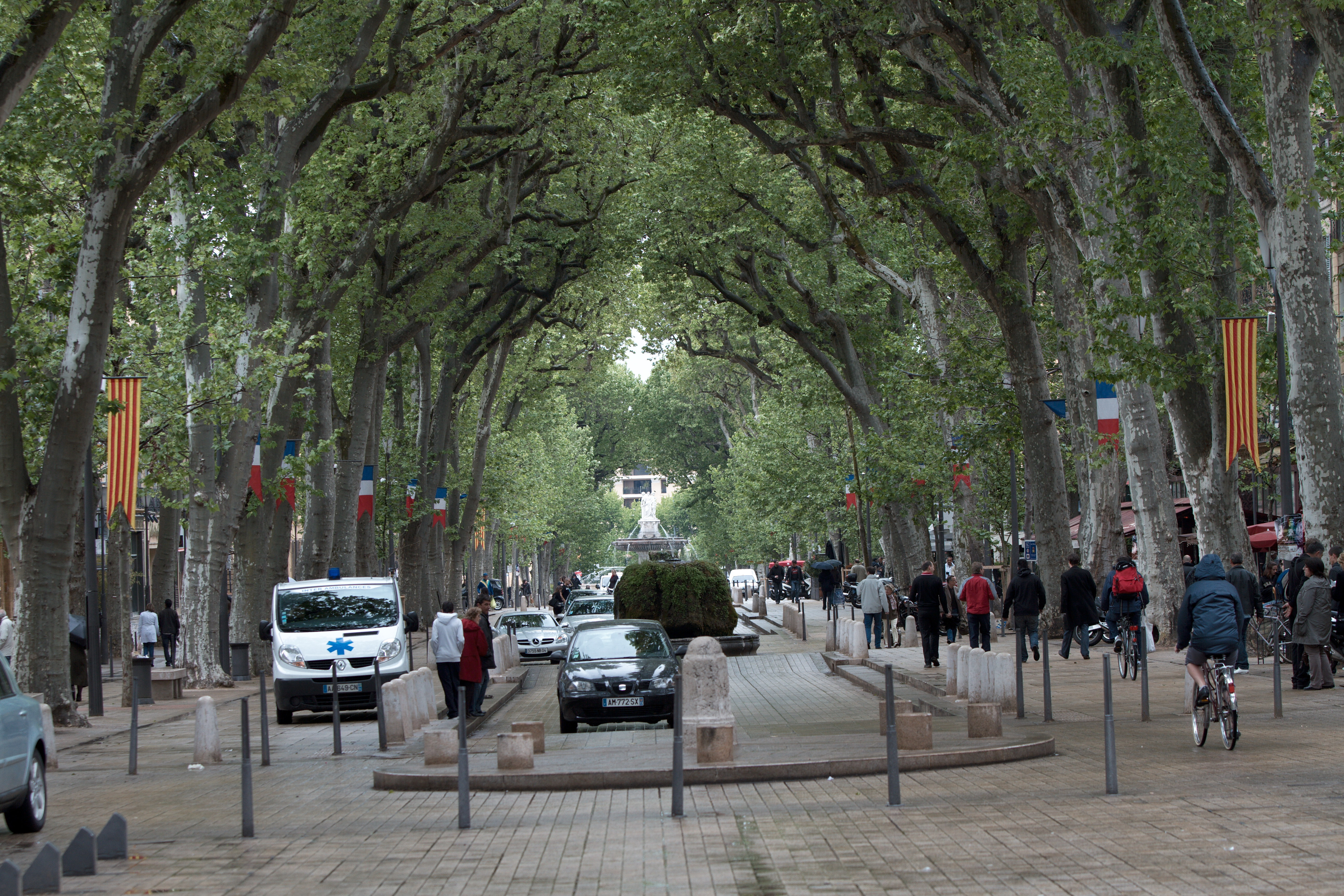 Le Cours Mirabeau à Aix-en-Provence (Bouches-du-Rhône, France)